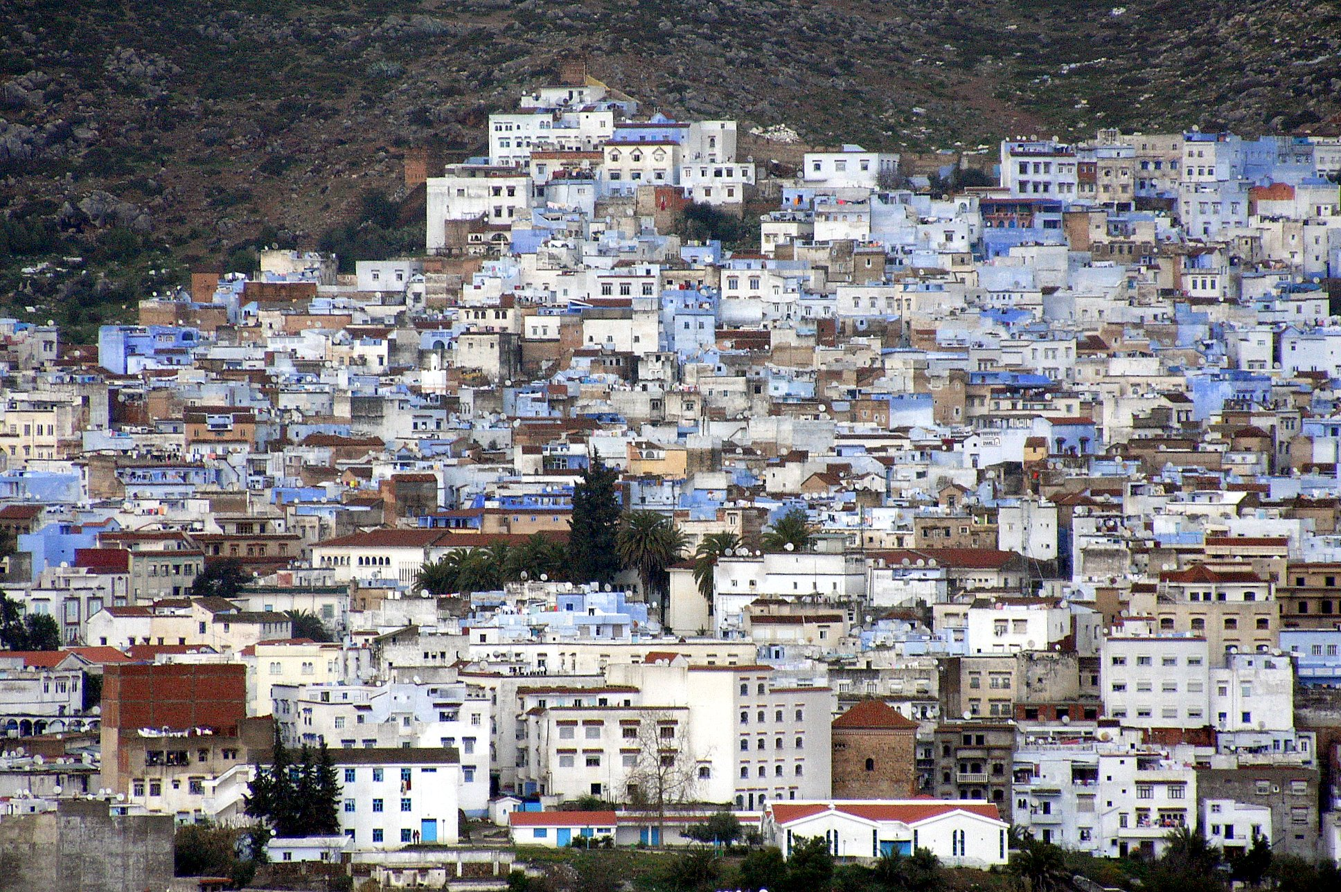 La ville prise depuis la route d'Ouezzane